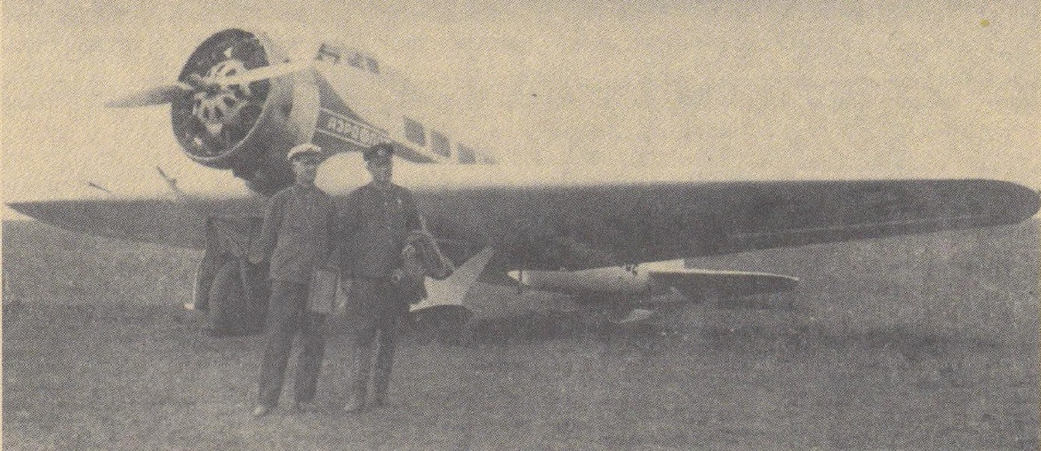 Пассажирский самолет ХАИ-1